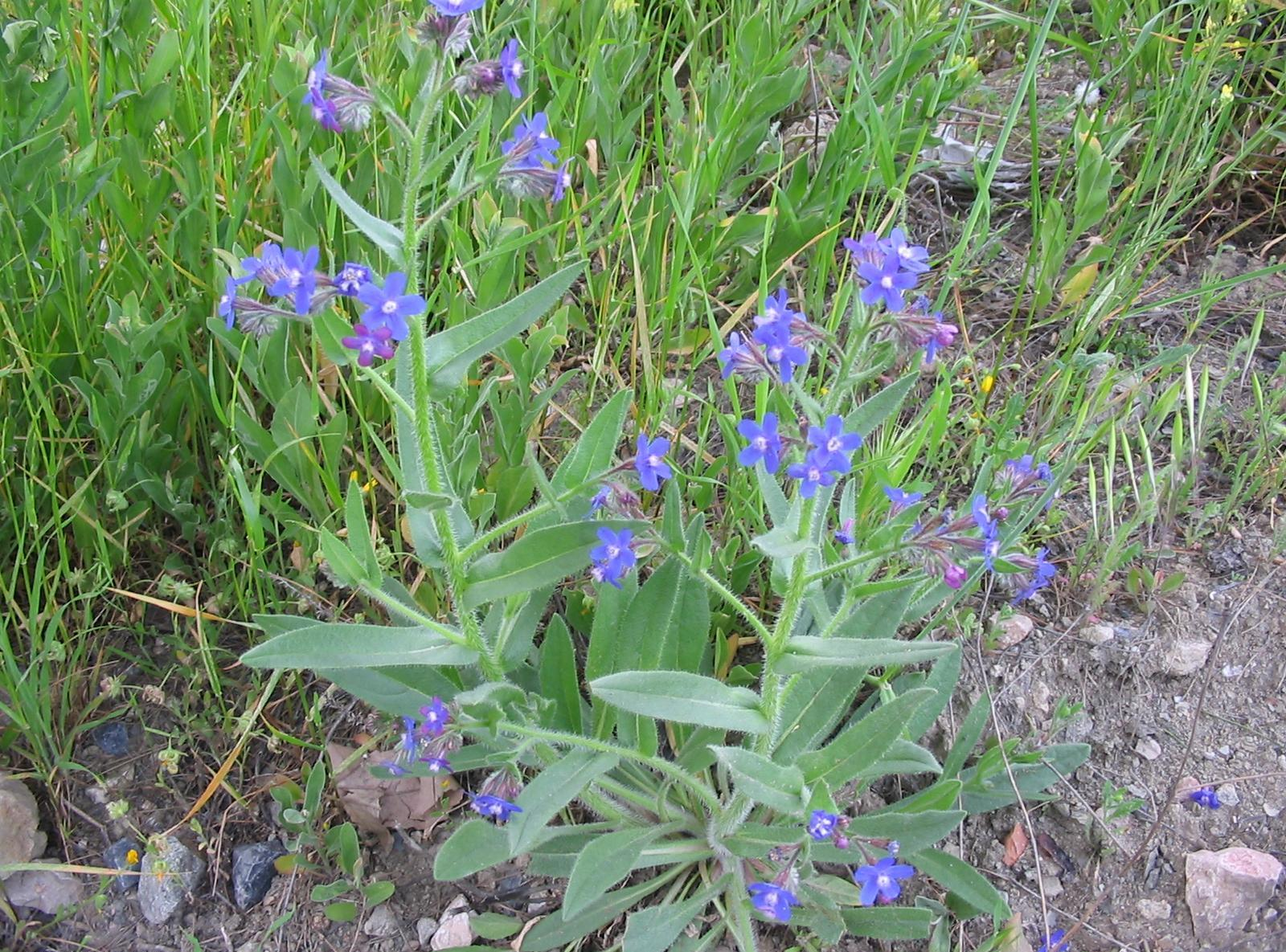 Fotos realizadas en un ejemplar de 45 cm de altura, a principios del mes de marzo, en la zona centro de España, Getafe (Madrid). Alberto Salguero Quiles